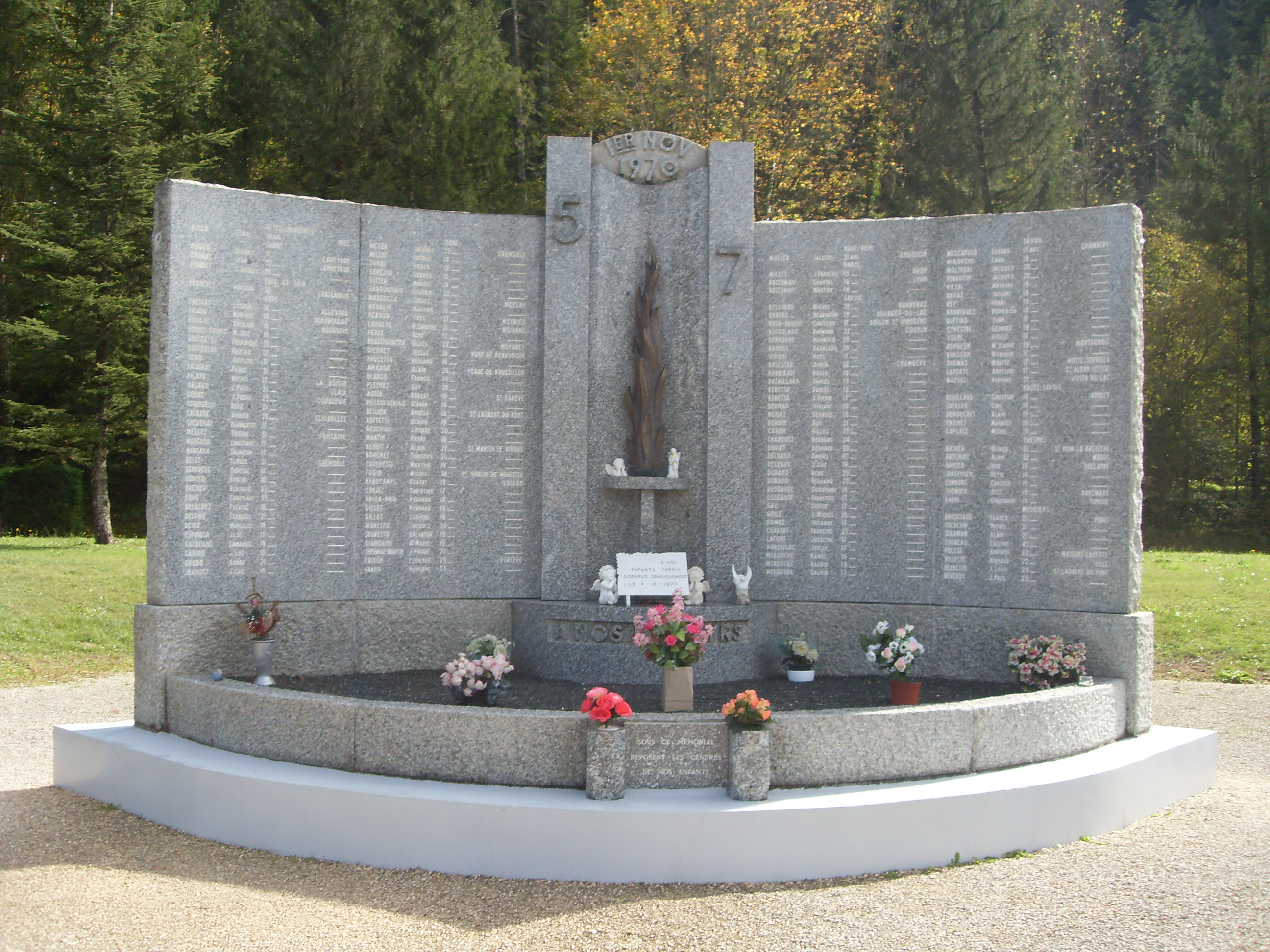 Mémorial de l'incendie du 5-7, inauguré le 13 juin 1976, à Saint-Laurent-du-Pont.